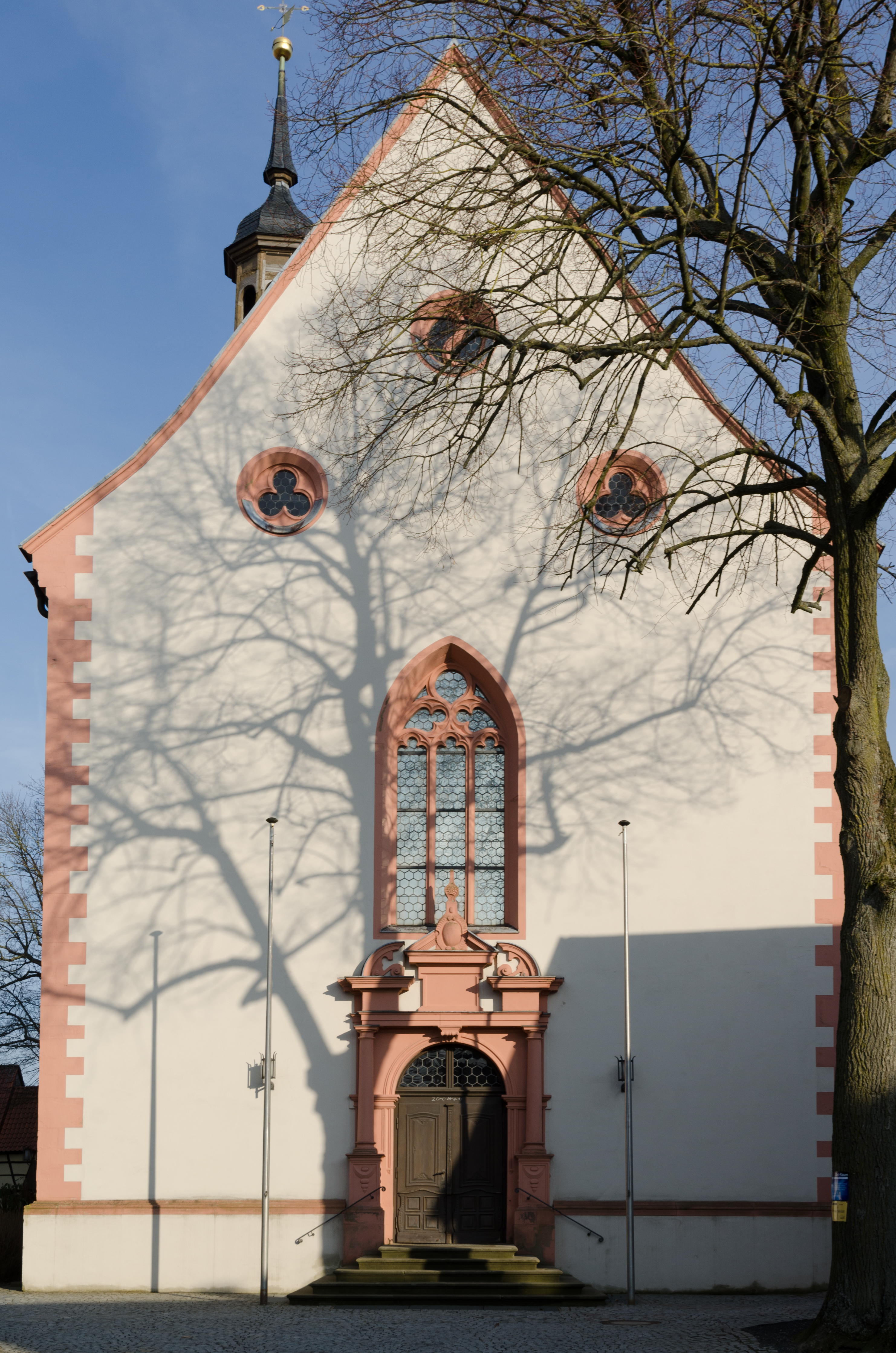 Geldersheim, Kath. Pfarrkirche St. Nikolaus